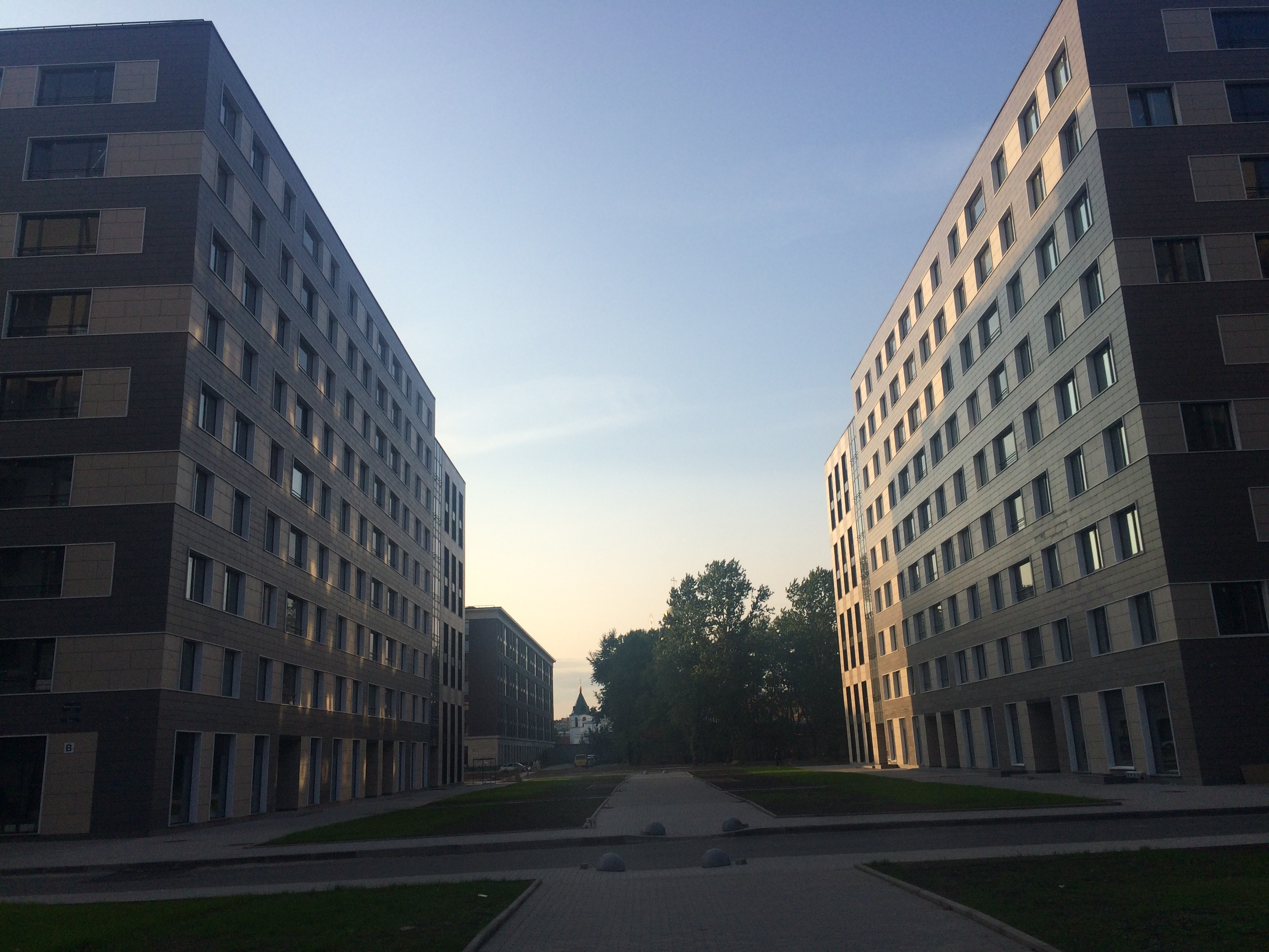 Внутриквартальный бульвар жилого комплекса "Царская Столица" на Кременчугской улице. Вид на Товарный переулок и Собор Феодоровской иконы Божией Матери (Романовский собор).